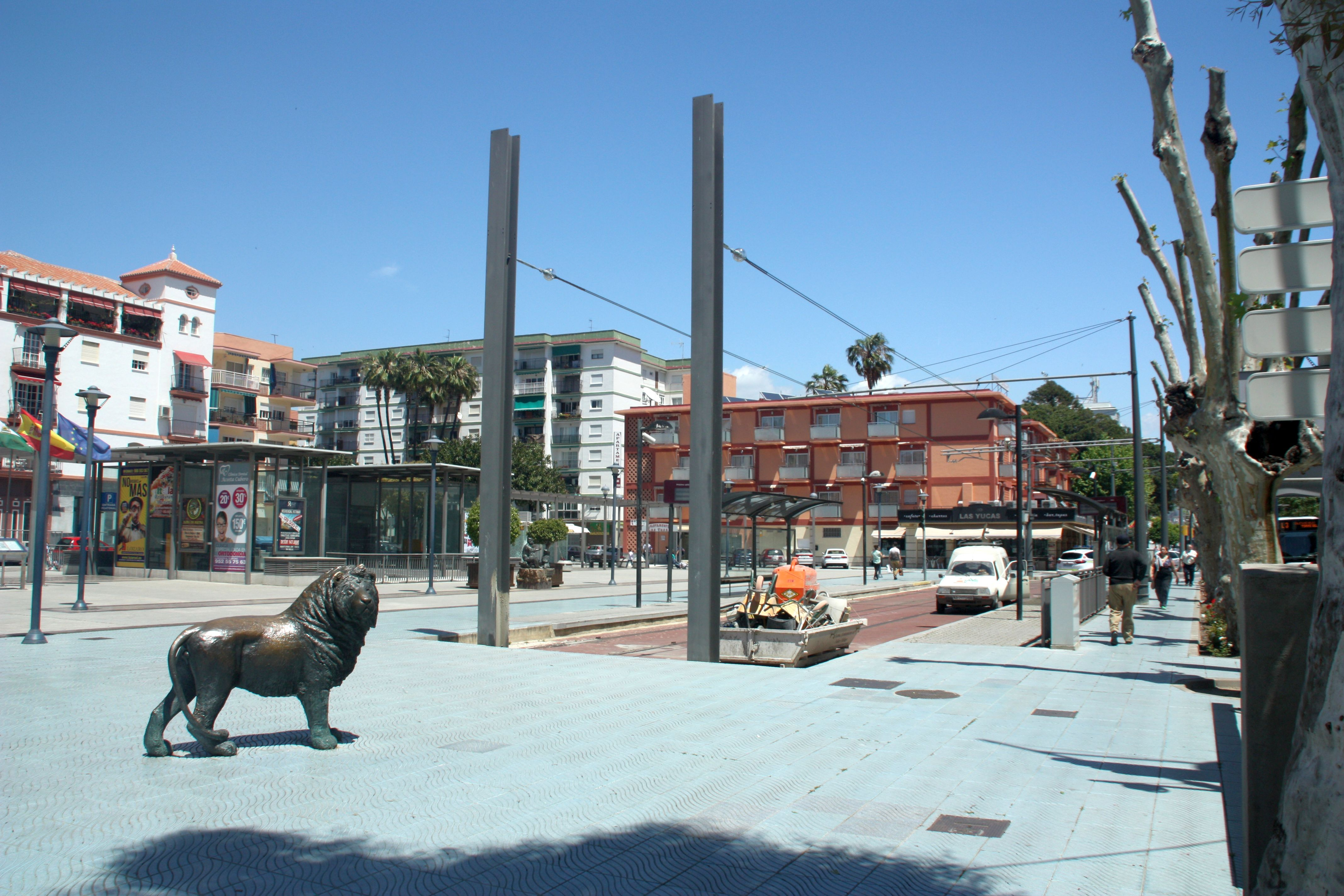 Straßenbahnendpunkt in Torre del Mar (zur Zeit nicht in Betrieb)